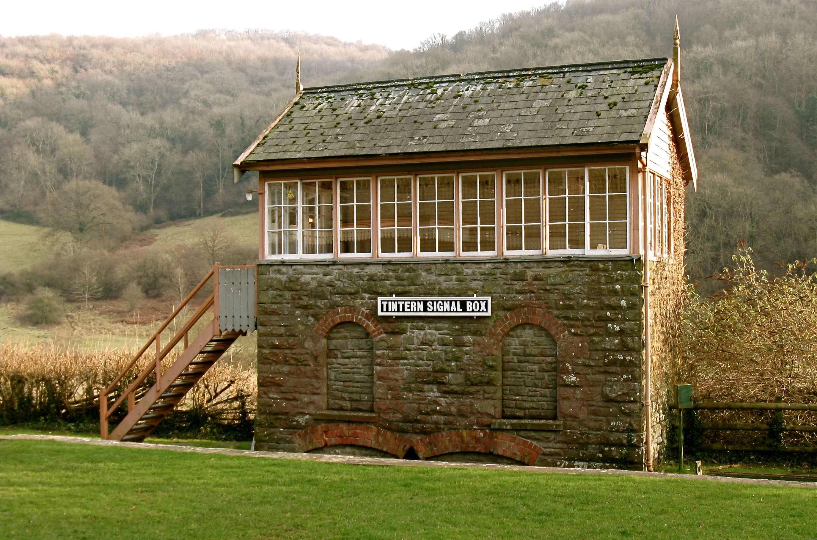 B l a c k M a g i c